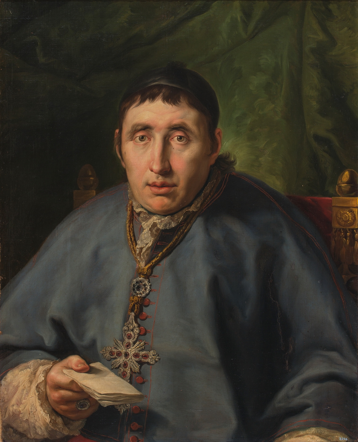 Retrato del prelado español Pedro González Vallejo (1770-1842), obispo dimisionario de Mallorca y Presidente del Estamento de Próceres entre 1835 y 1836. Esta es una réplica del lienzo idéntico que se subastó a mediados del mes de agosto de 2013.